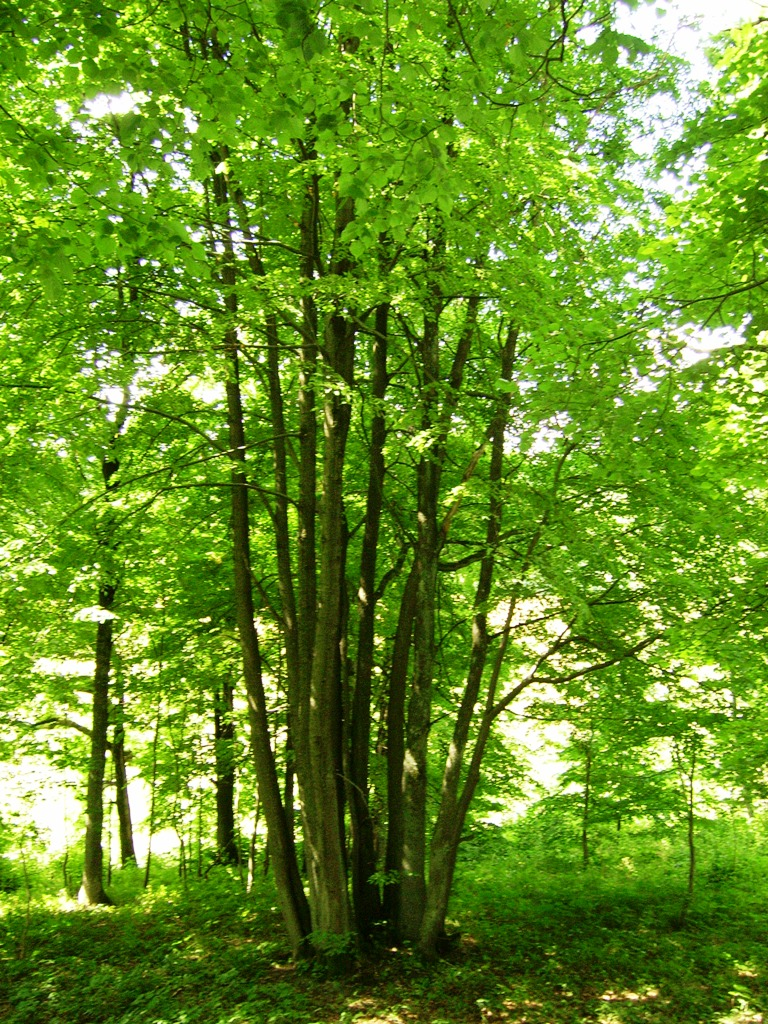 Dvylikos kamienų liepa auganti ant Biržų Lauko piliakalnio